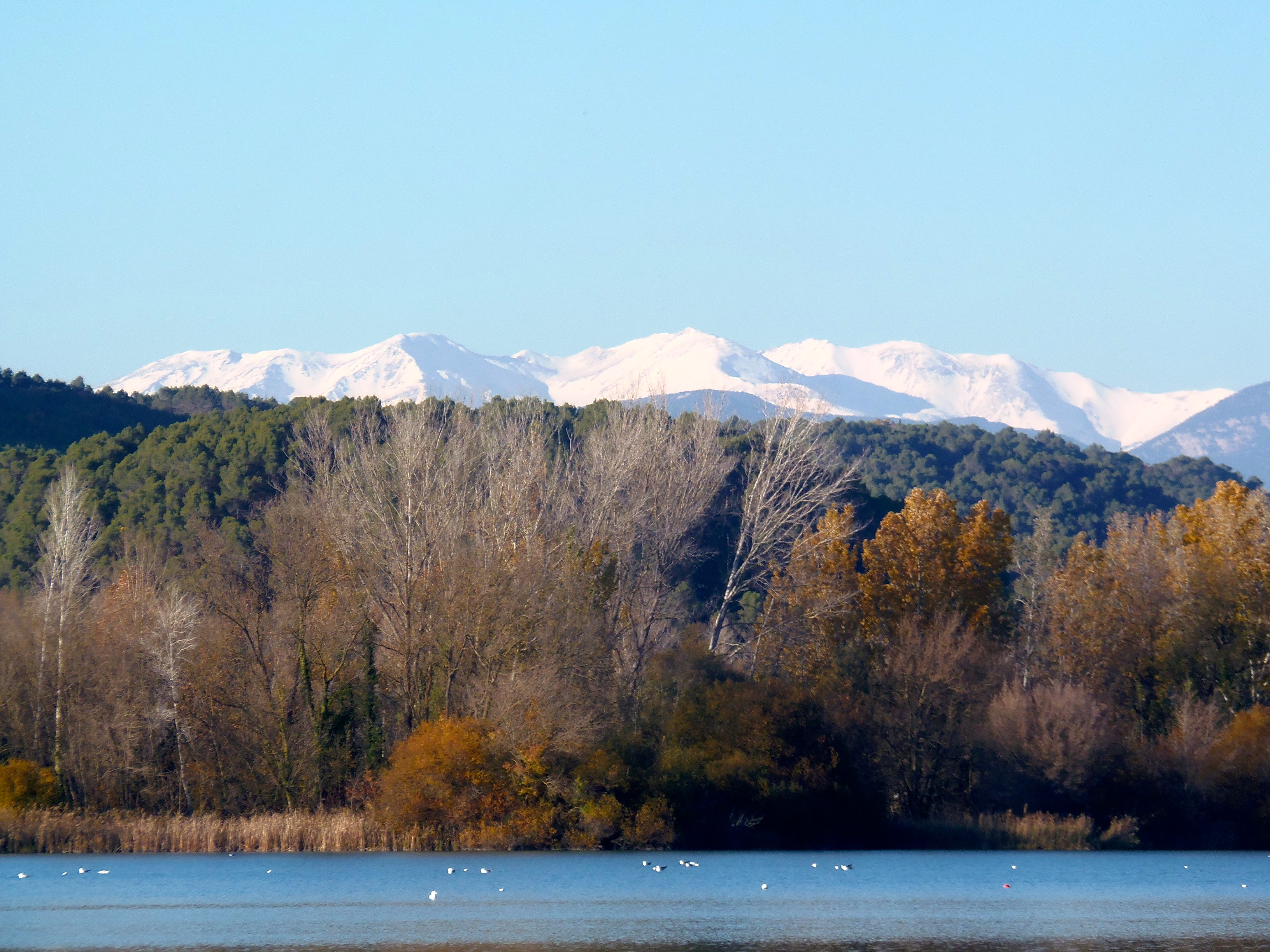 Estany de Banyoles i Pirineus nevats al fons This is a a photo of a natural area in Catalonia, Spain, with id: ES510107